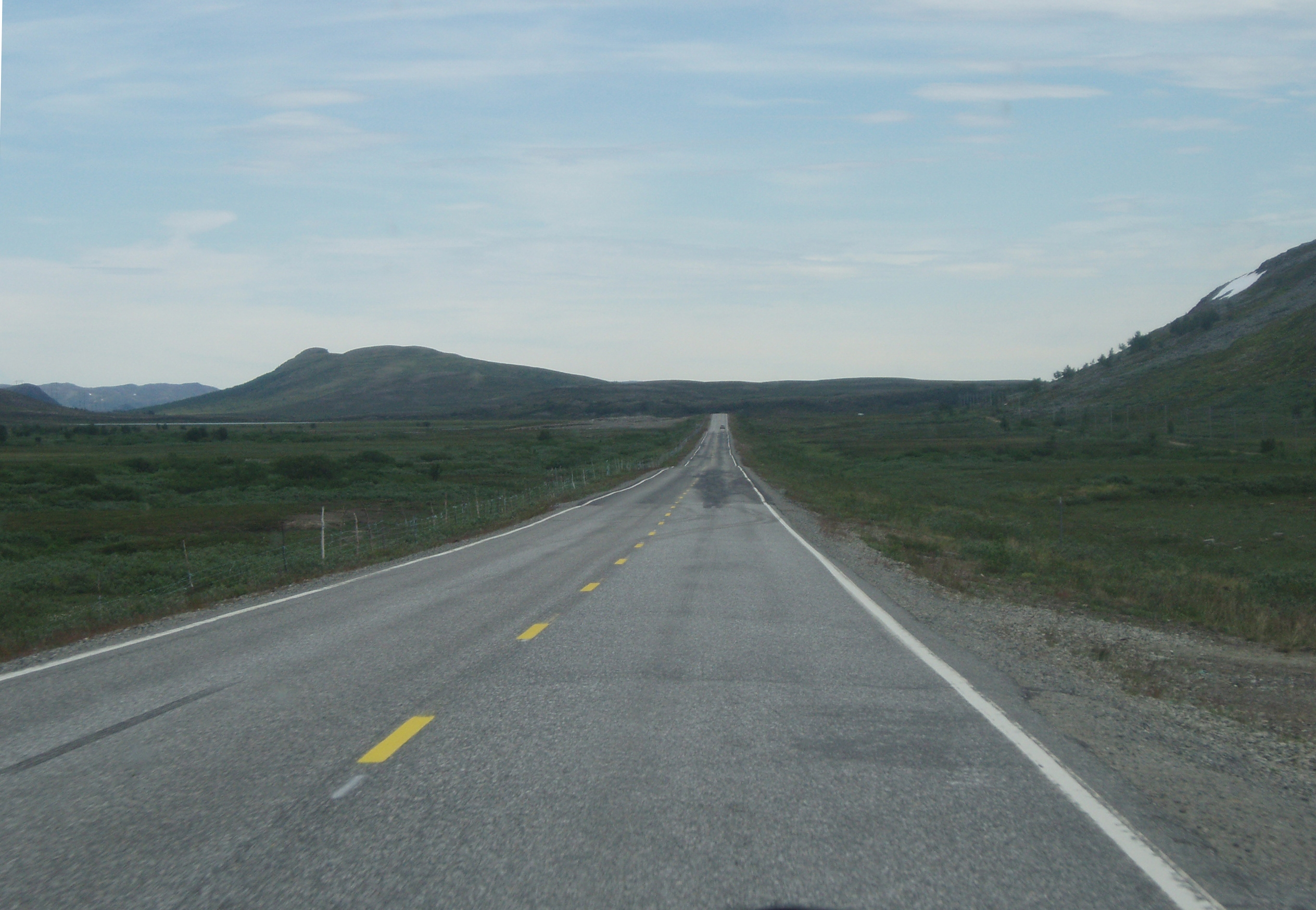 Sennalandet between Alta and Skaidi in Finnmark, Norway